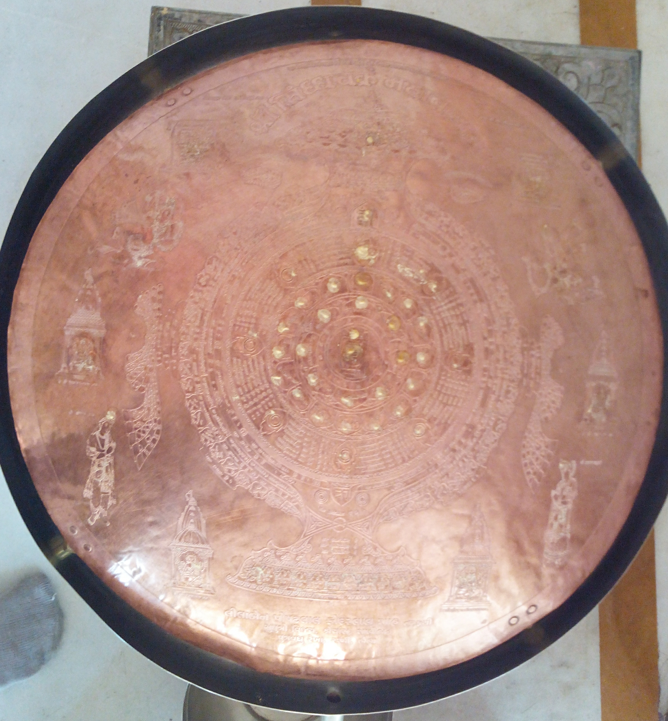 Siddhachakra Jainism